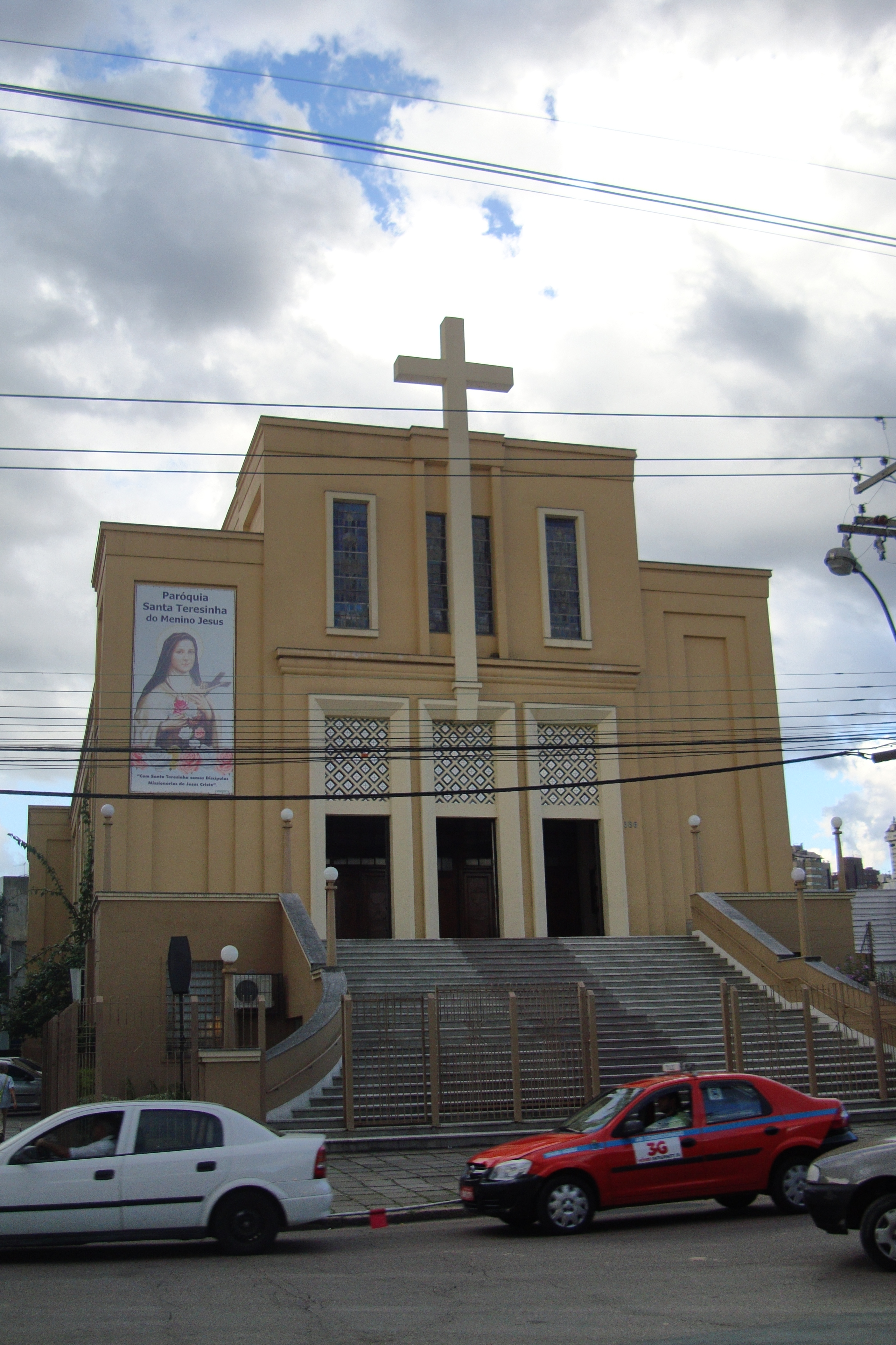 Igreja Santa Terezinha do Menino Jesus em Porto Alegre, na Rua Ramiro Barcelos.